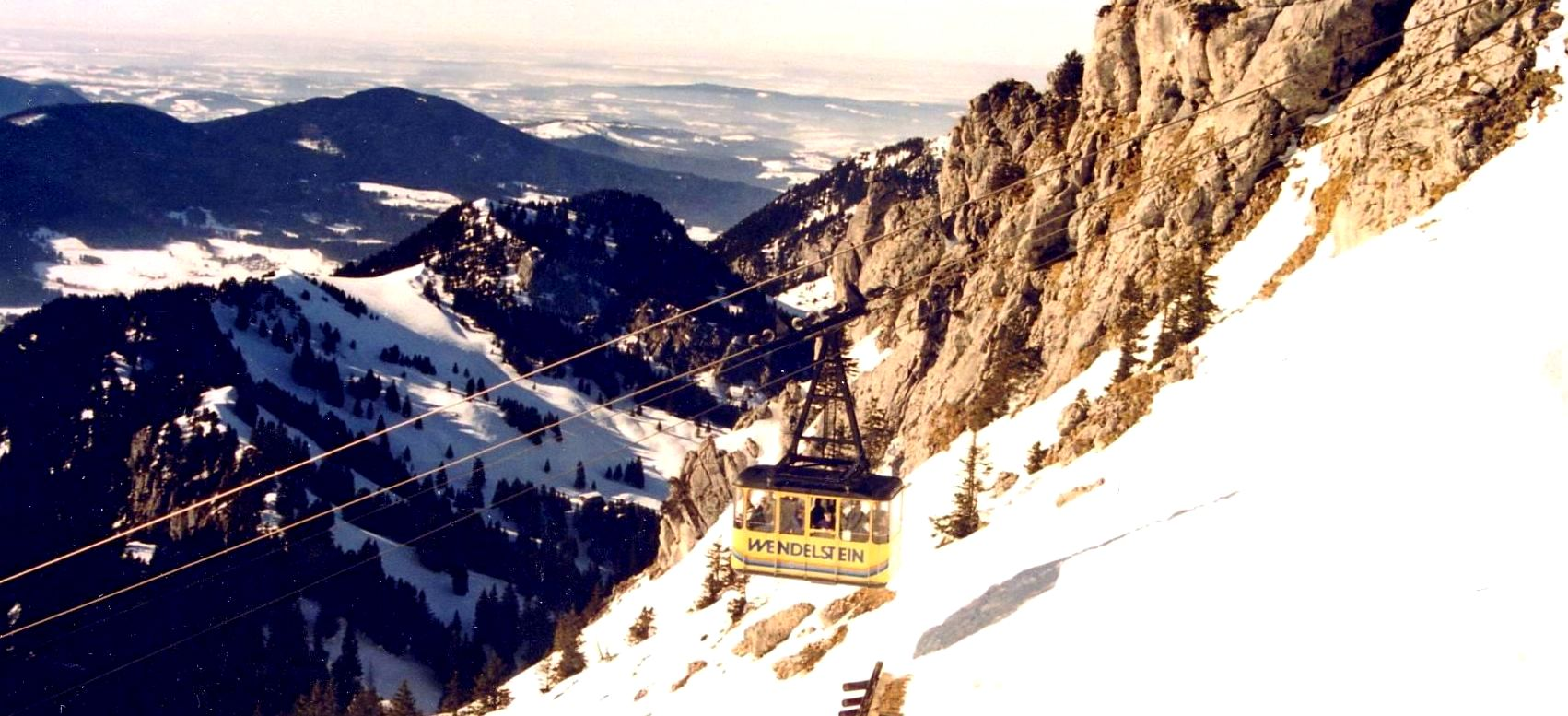 D'Kabinn vun vun der Wendelsteinseelbunn. Kategorie:Seelbunnen